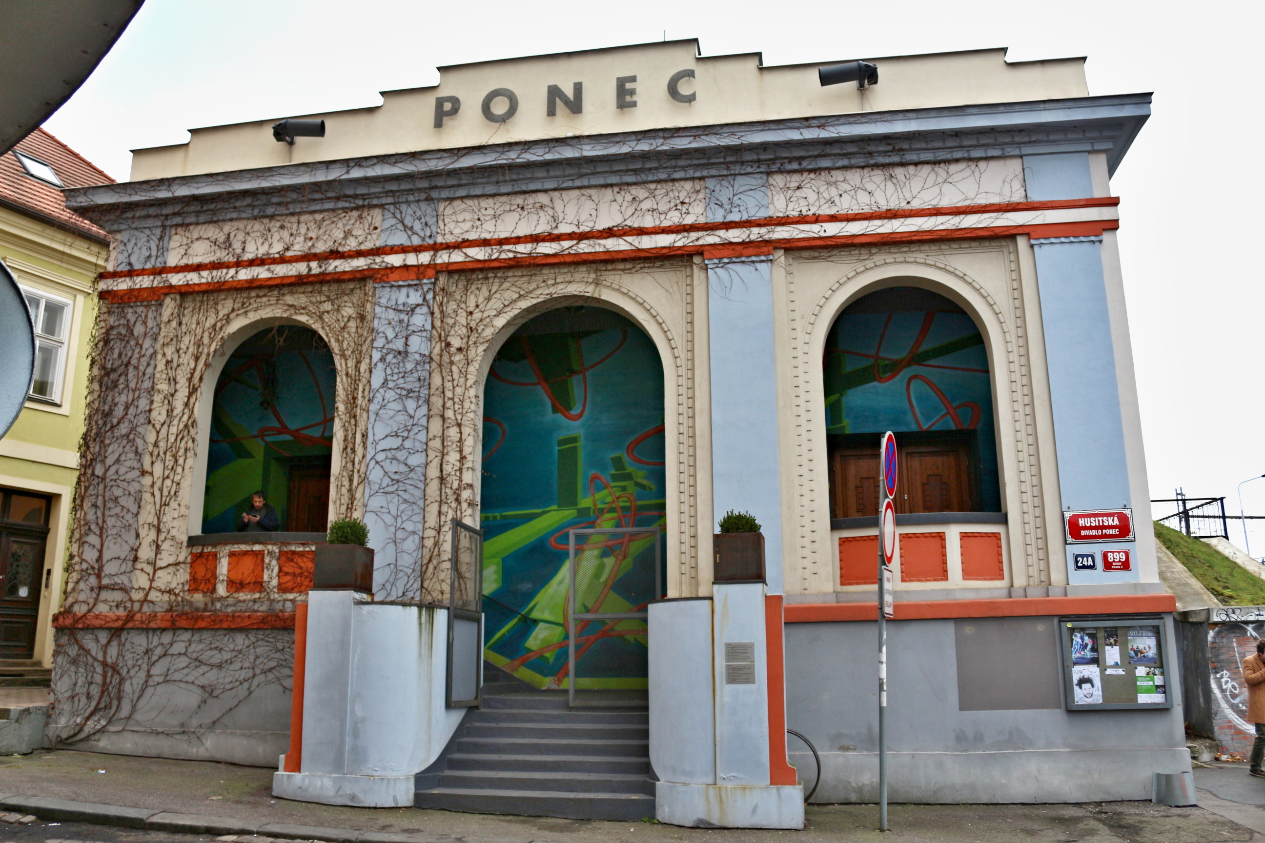 Divadlo Ponec